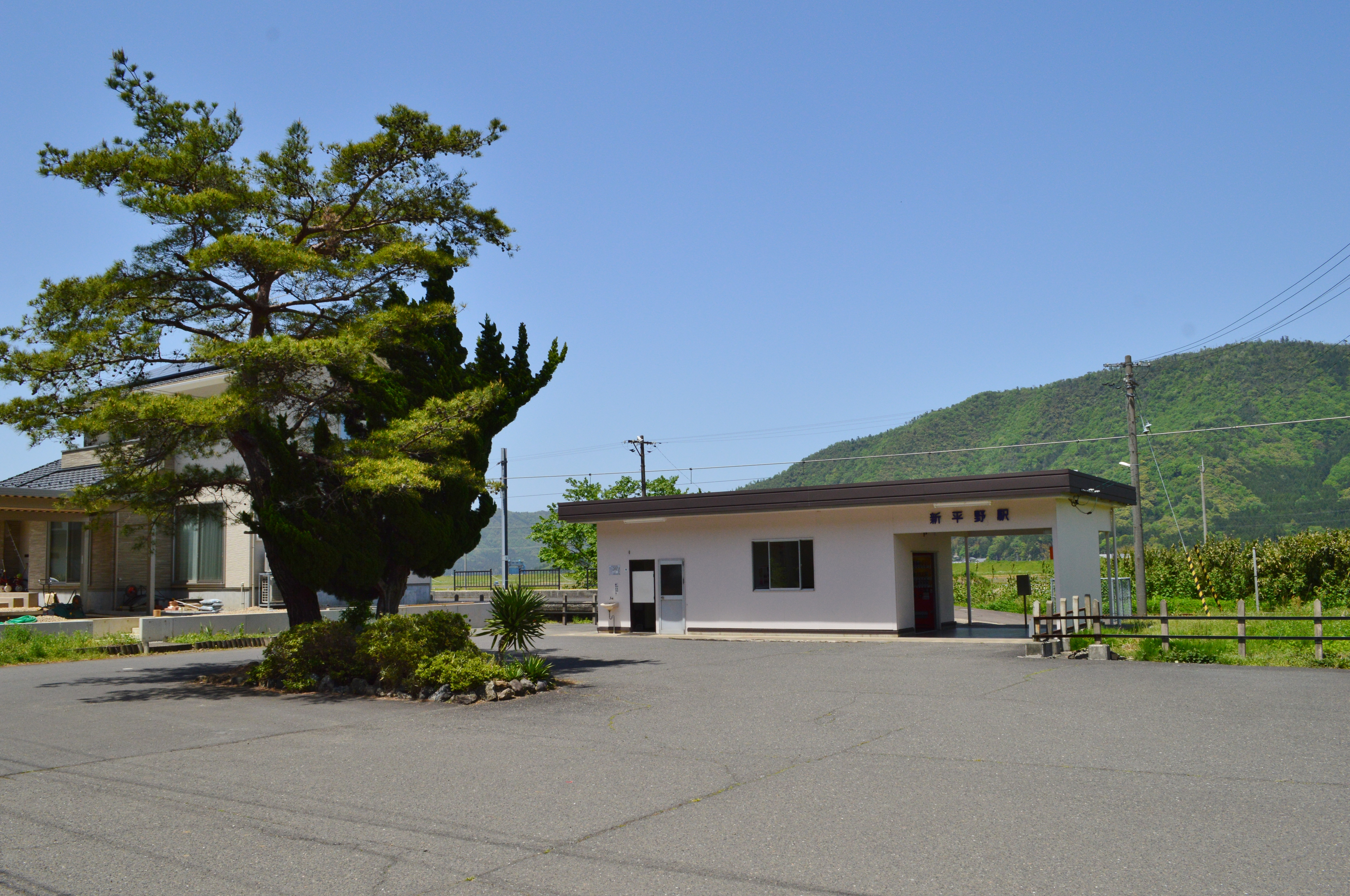 新平野駅 駅舎